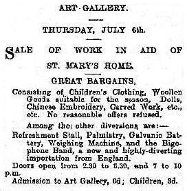 Annonce dans un journal néo-zélandais où il est mentionné un ensemble de bigophones.